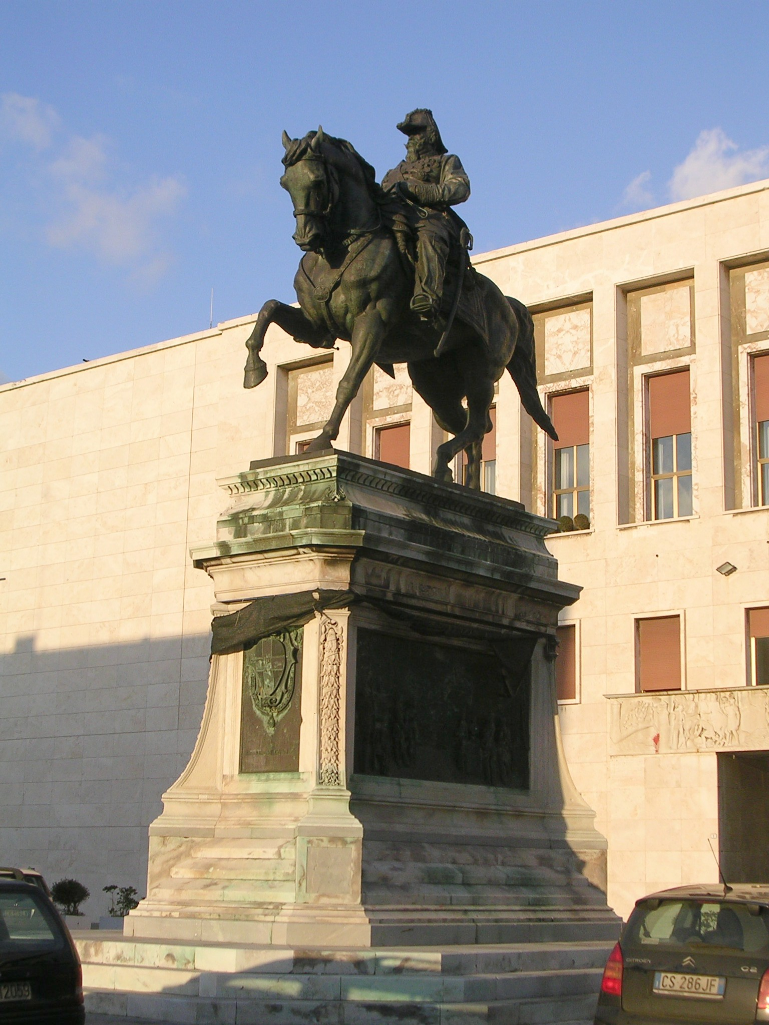 Livorno: il Monumento a Vittorio Emanuele II di Augusto Rivalta.